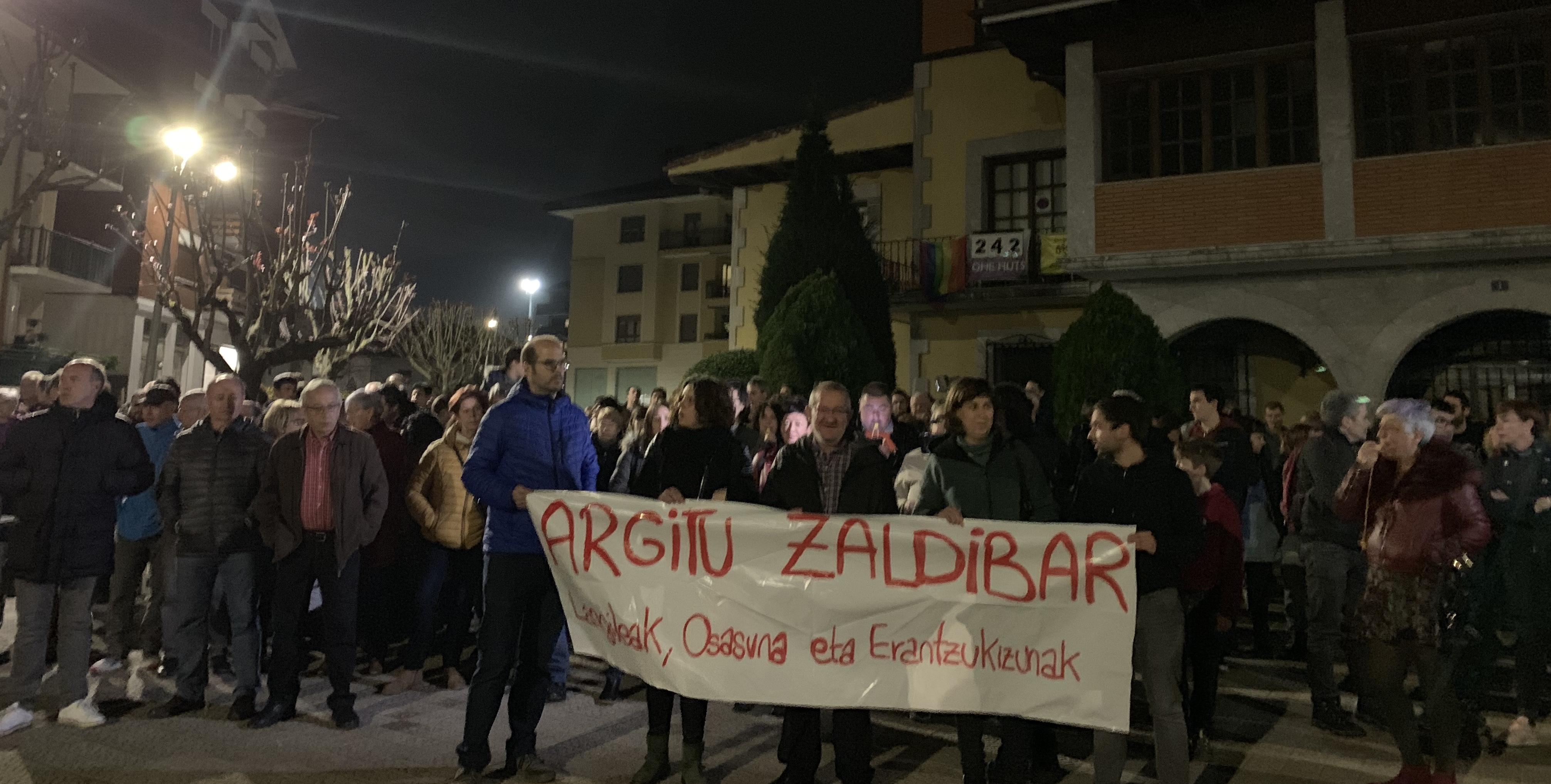 Zaldibarko zabortegiaren hondamendia argitzea eskatzeko manifestazioa, «Argitu Zaldibar».